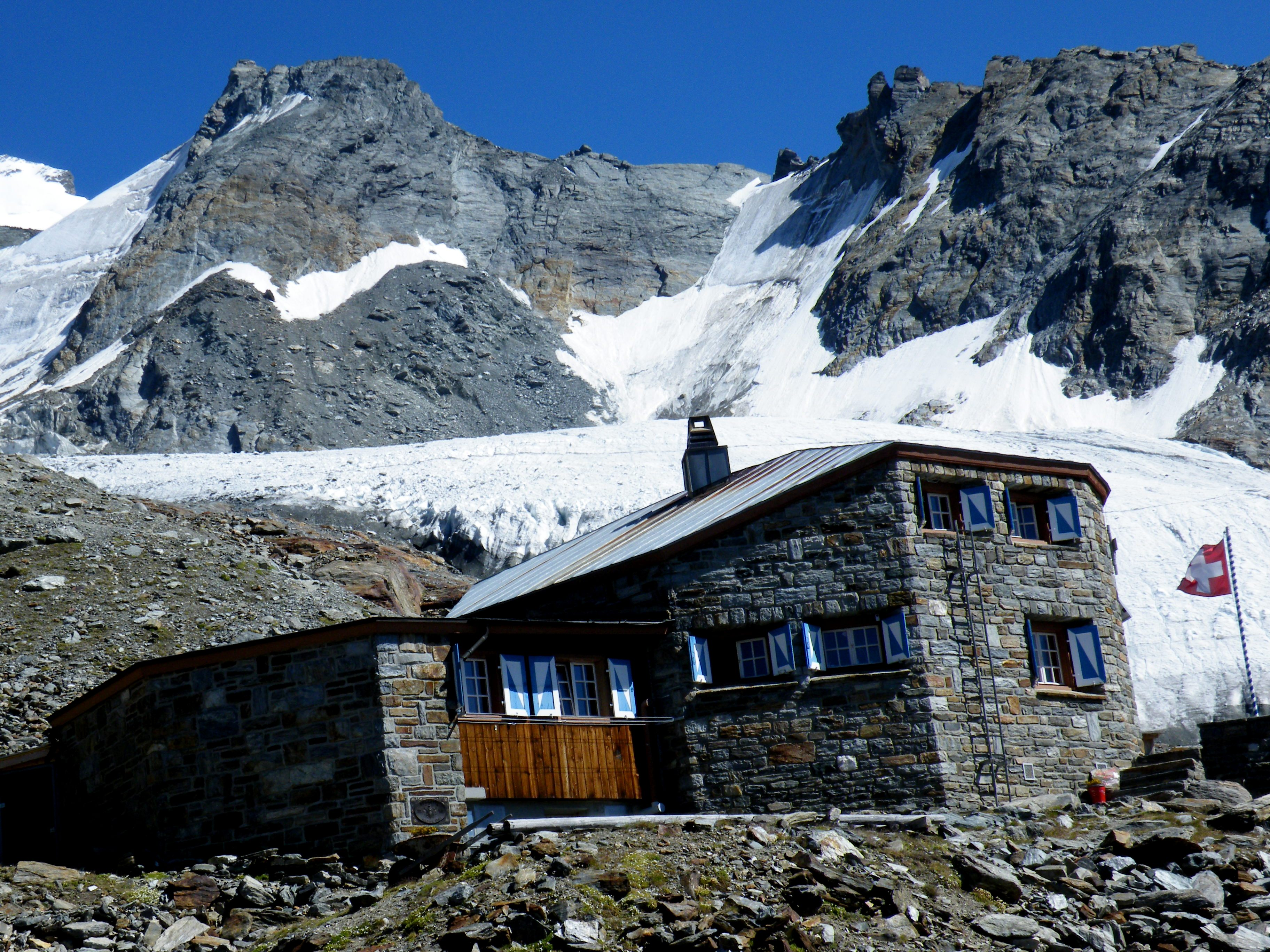 Domhütte (2940 m)